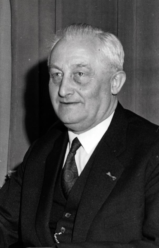 M. van Veen (P.v.d.A) benoemd tot Staatssecretaris van oorlog. Nederland, 16 oktober 1958.